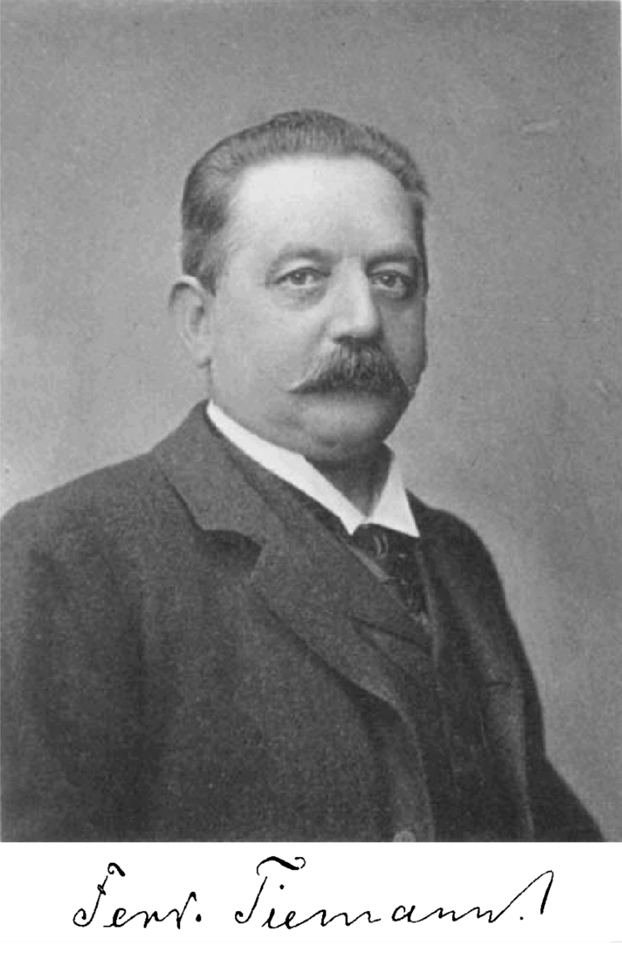 Ferdinand Tiemann (* 10. Juni 1848 in Rübeland; † 14. November 1899 in Meran, Italien)